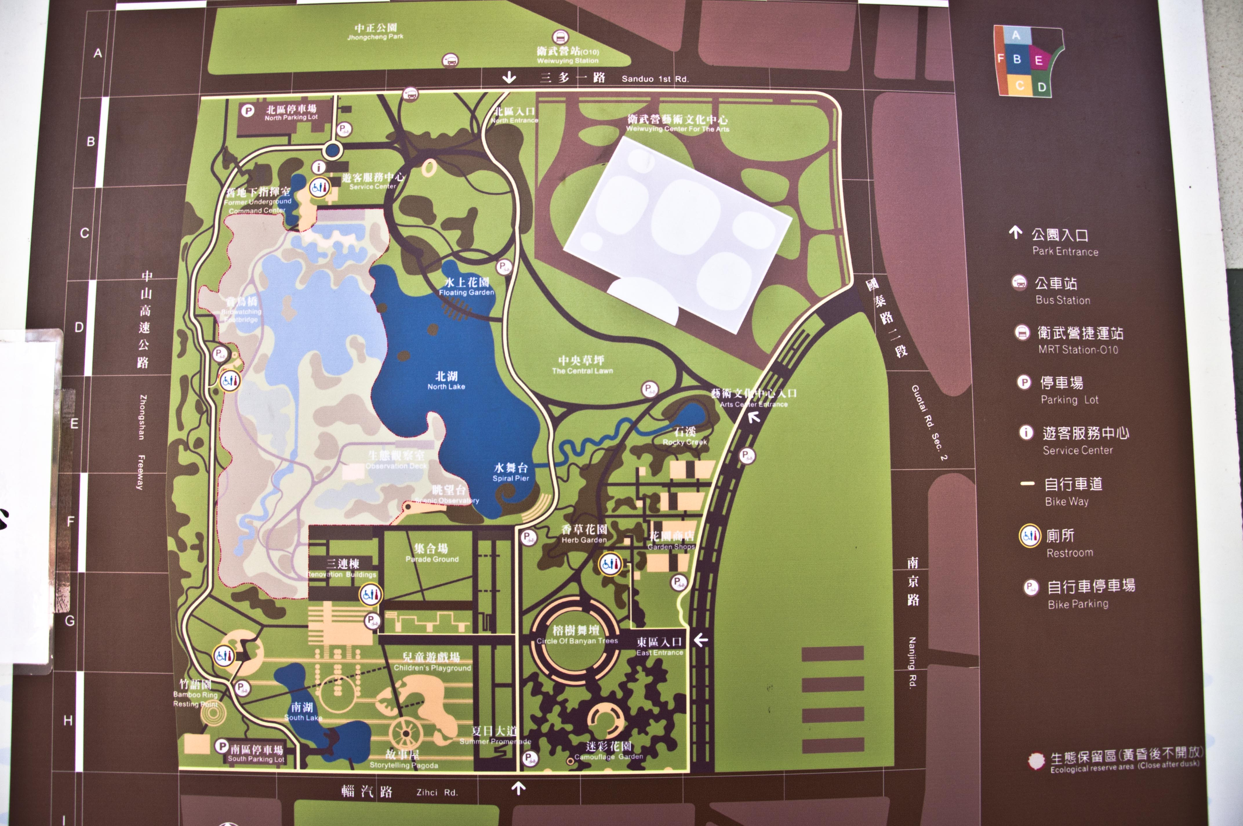 衛武營都會公園地圖